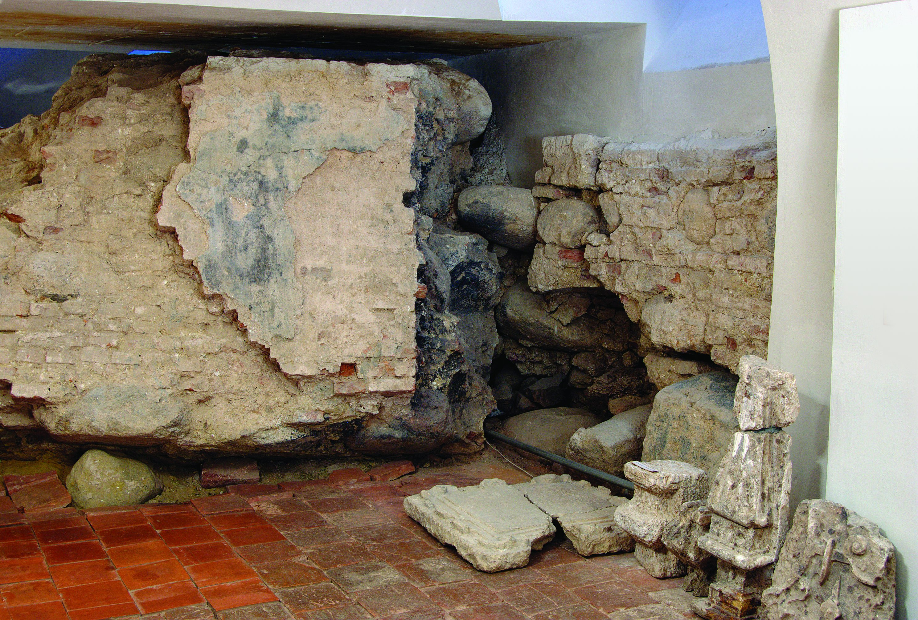 Archeologijos ekspozicija